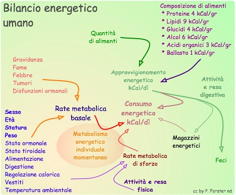 Bilancio energetico umano, sesso, età, statura, peso corporeo, alimentazione